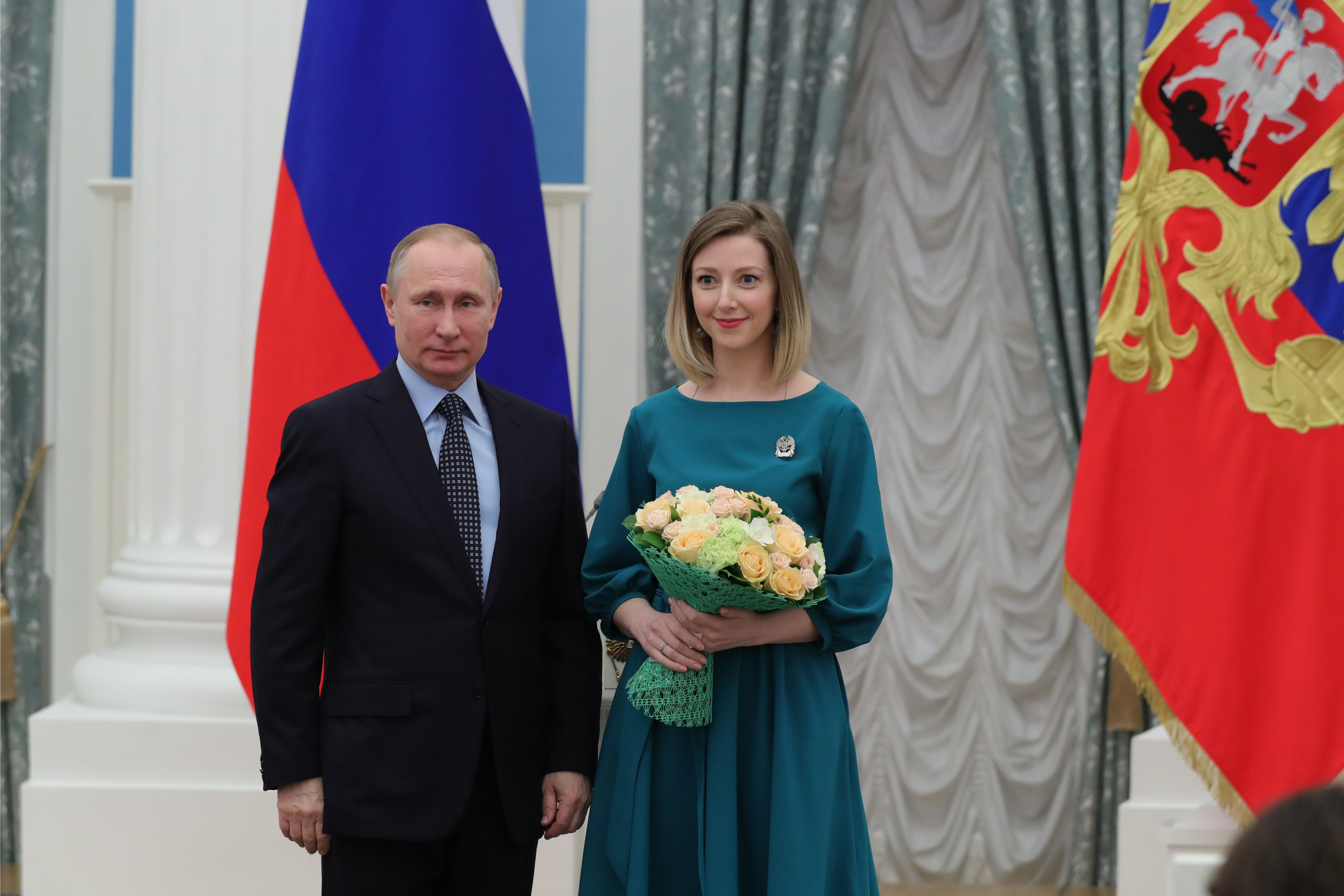 Премии Президента в области литературы и искусства за произведения для детей и юношества 2016 года удостоен поэт, переводчик, детский писатель, Анастасия Орлова.